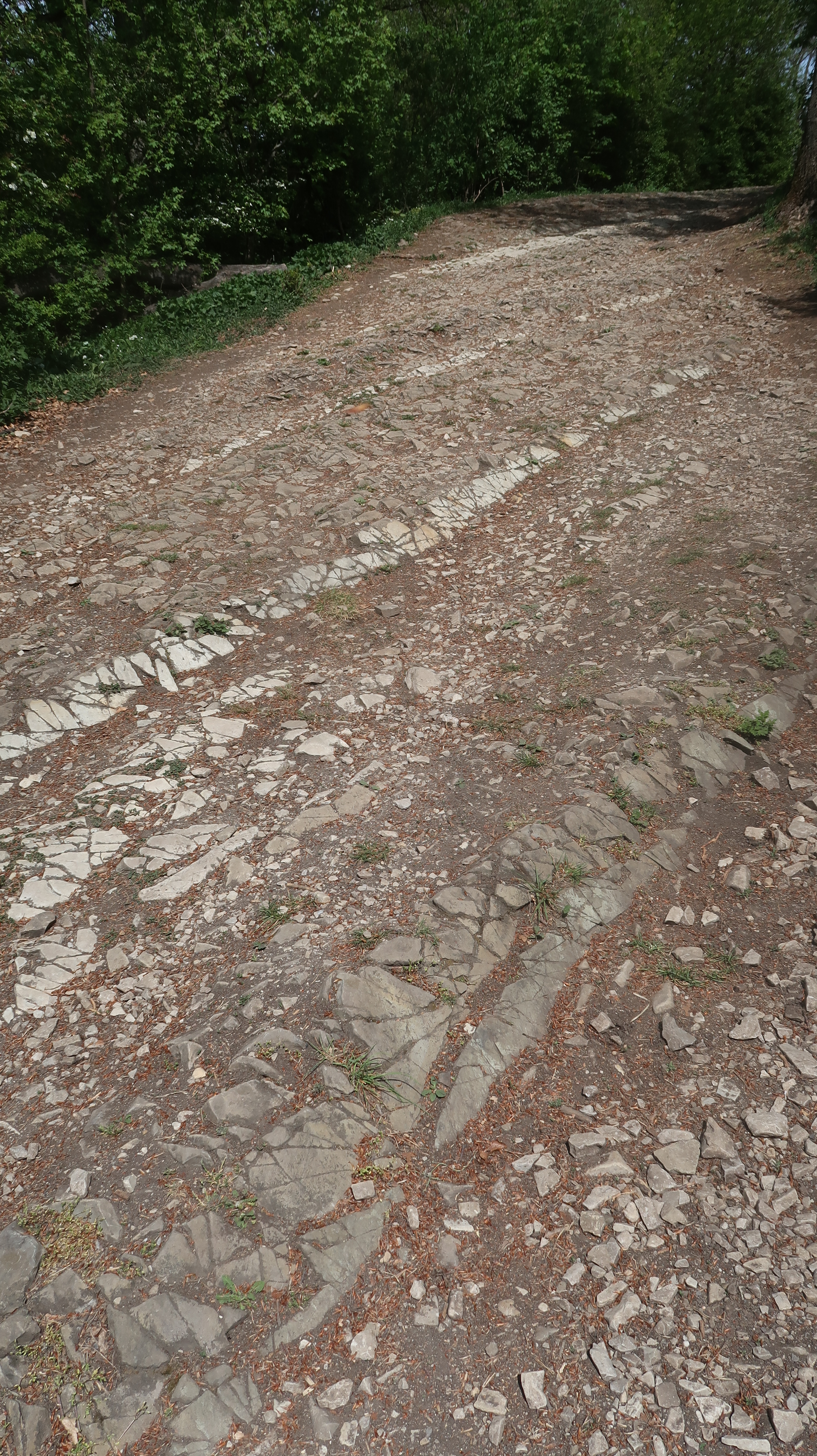 Die grauen bis weißen Flysch-Schichten streichen von SW nach NO und fallen unter einem Winkel von ca 30° nach SO ein.